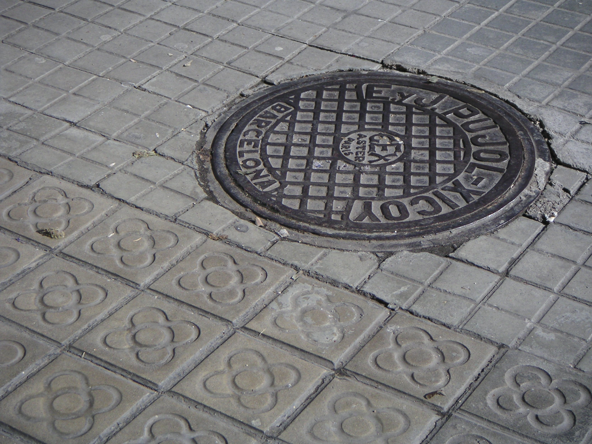 Dos models de les tres rajoles que cobreixen la major part del terra de Barcelona: "flor", "rajola de xocolata" i "peça de lego". A més, en zones especials, com per exemple al Passeig de Gràcia, les rajoles són diferentes.